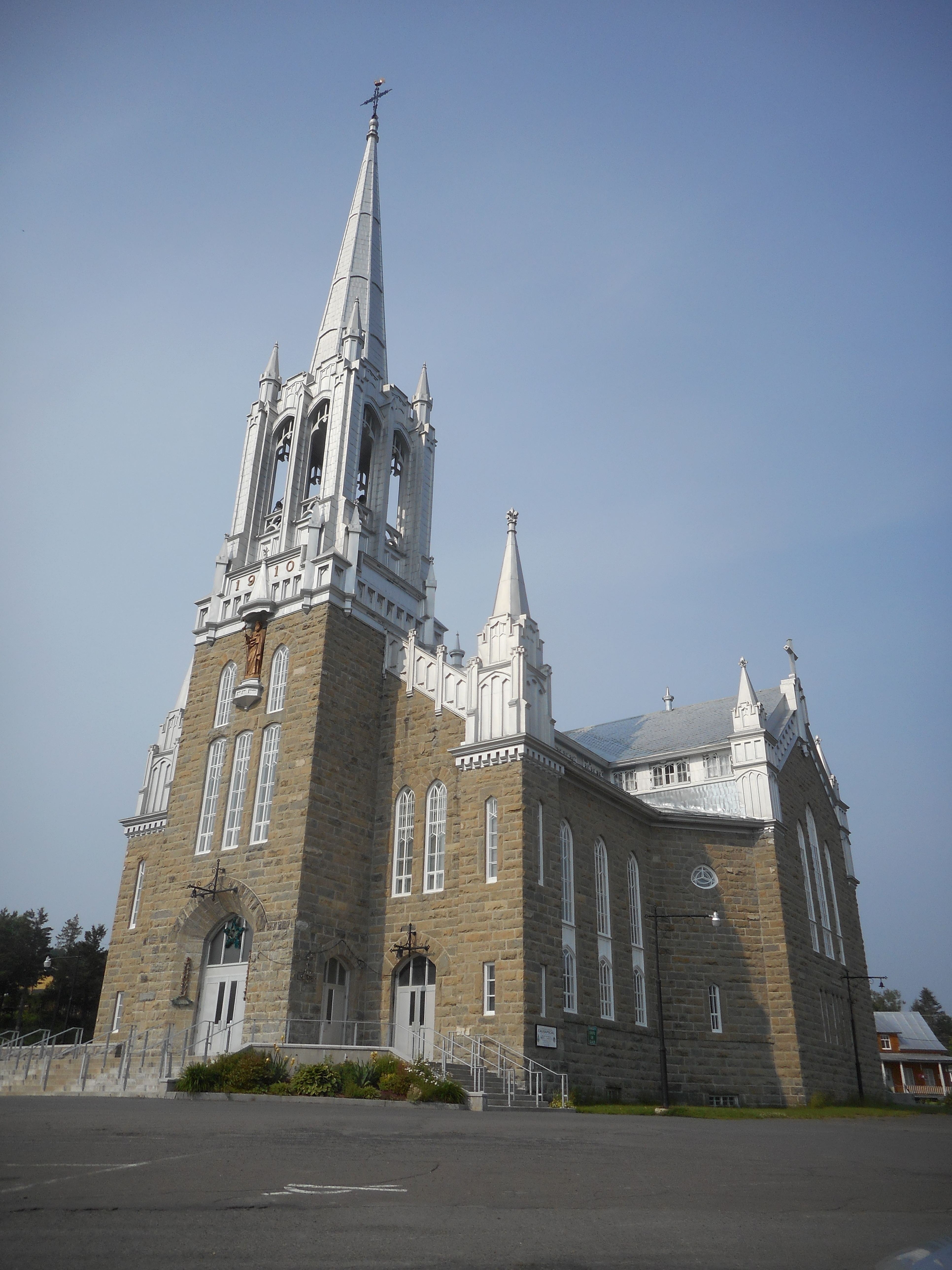 Église de Saint-Jacques-le-Majeur, 100, place de l'Église, Causapscal, Québec